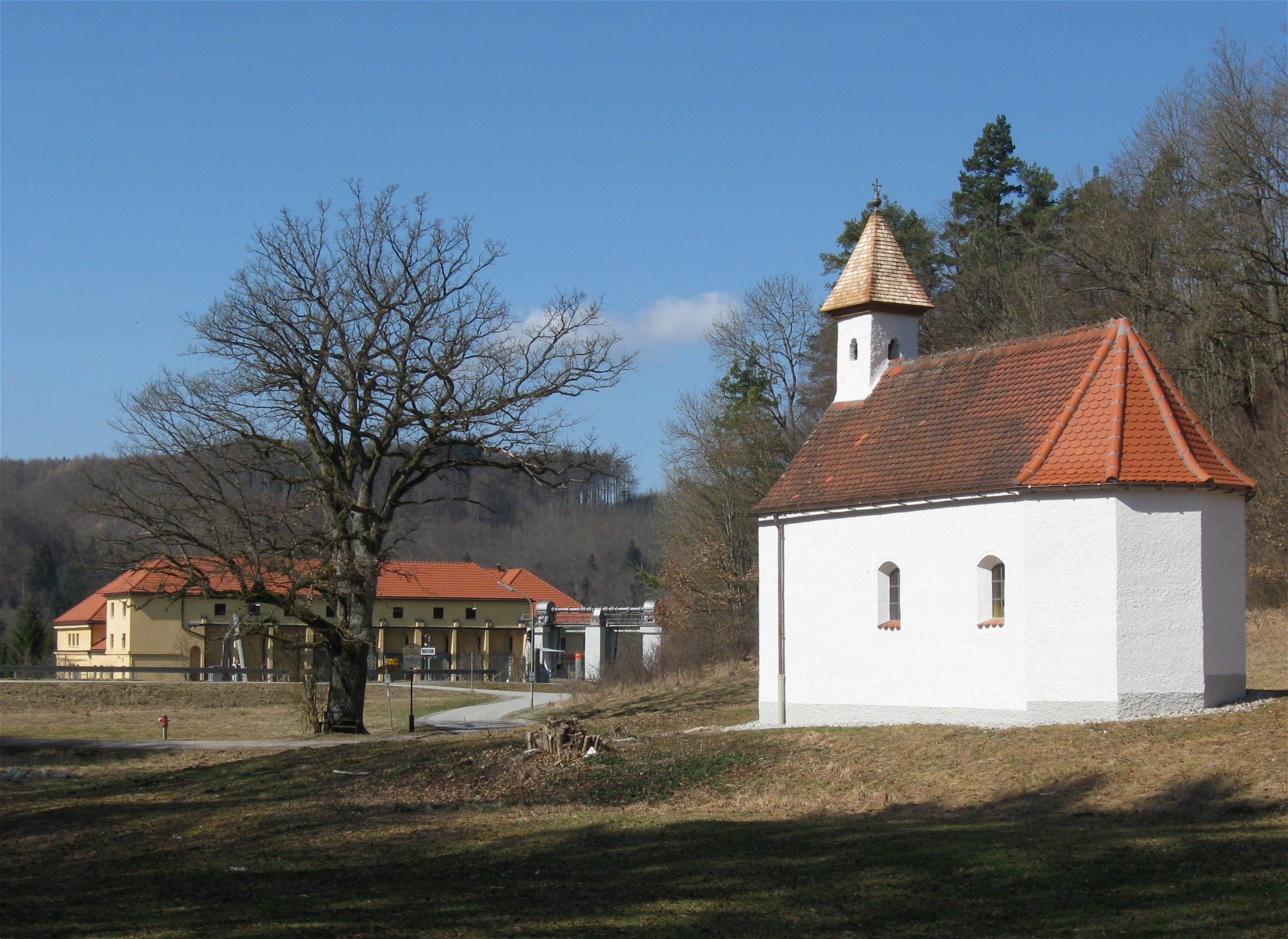 Straßlach-Dingharting, Mühltal; Kath. Kapelle St. Ulrich, mit Dachreiter, wohl 1617